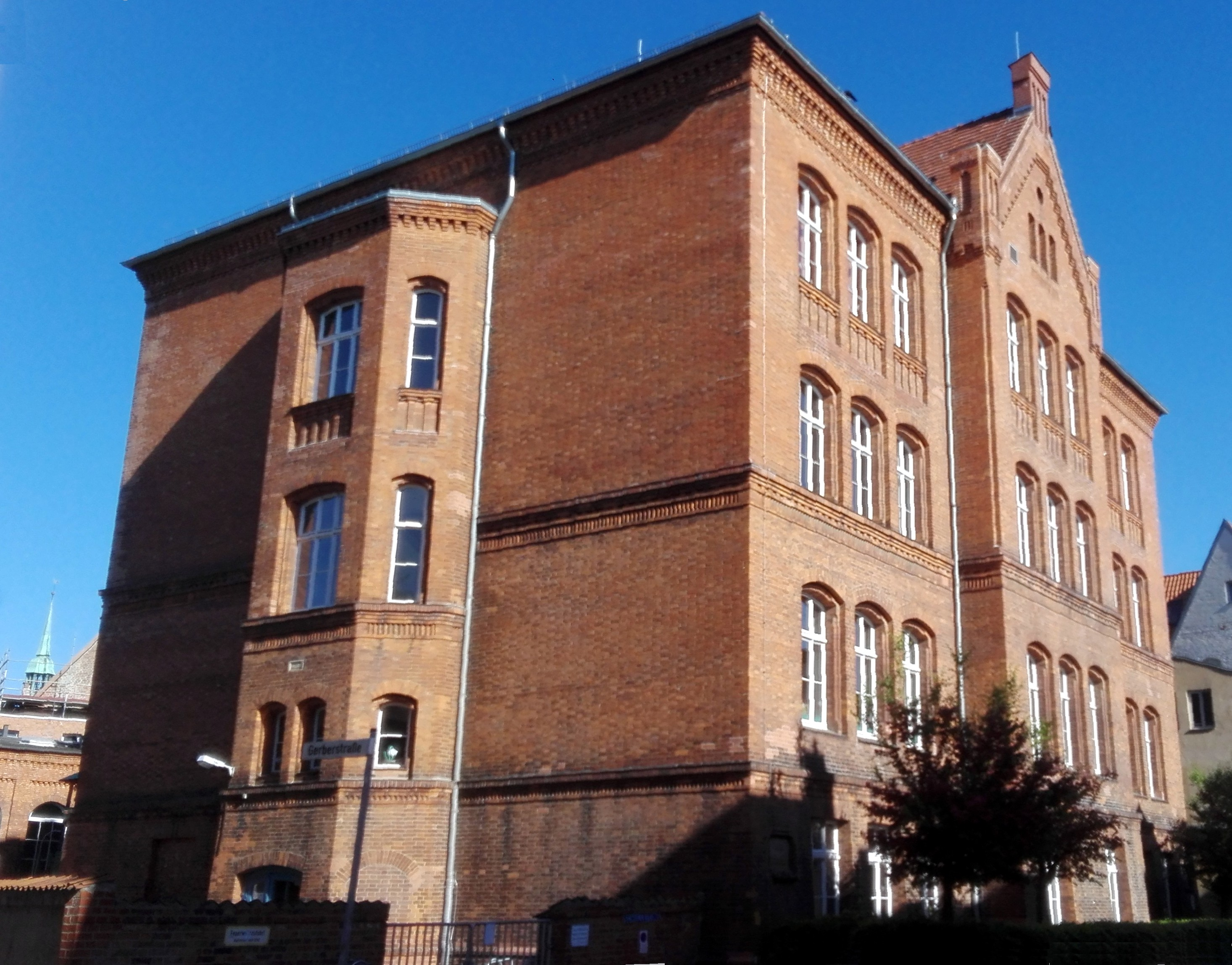 ehemalige Marien-Knabenschule in der Lübecker Altstadt am Langen Lohberg 6–8